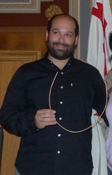 Gorka Artola (alkate berria) eta Elena Lete (kargua uzten), Bergara. Aginte-makilaren funtzioa duen zumea pasatu dio Letek Artolari.